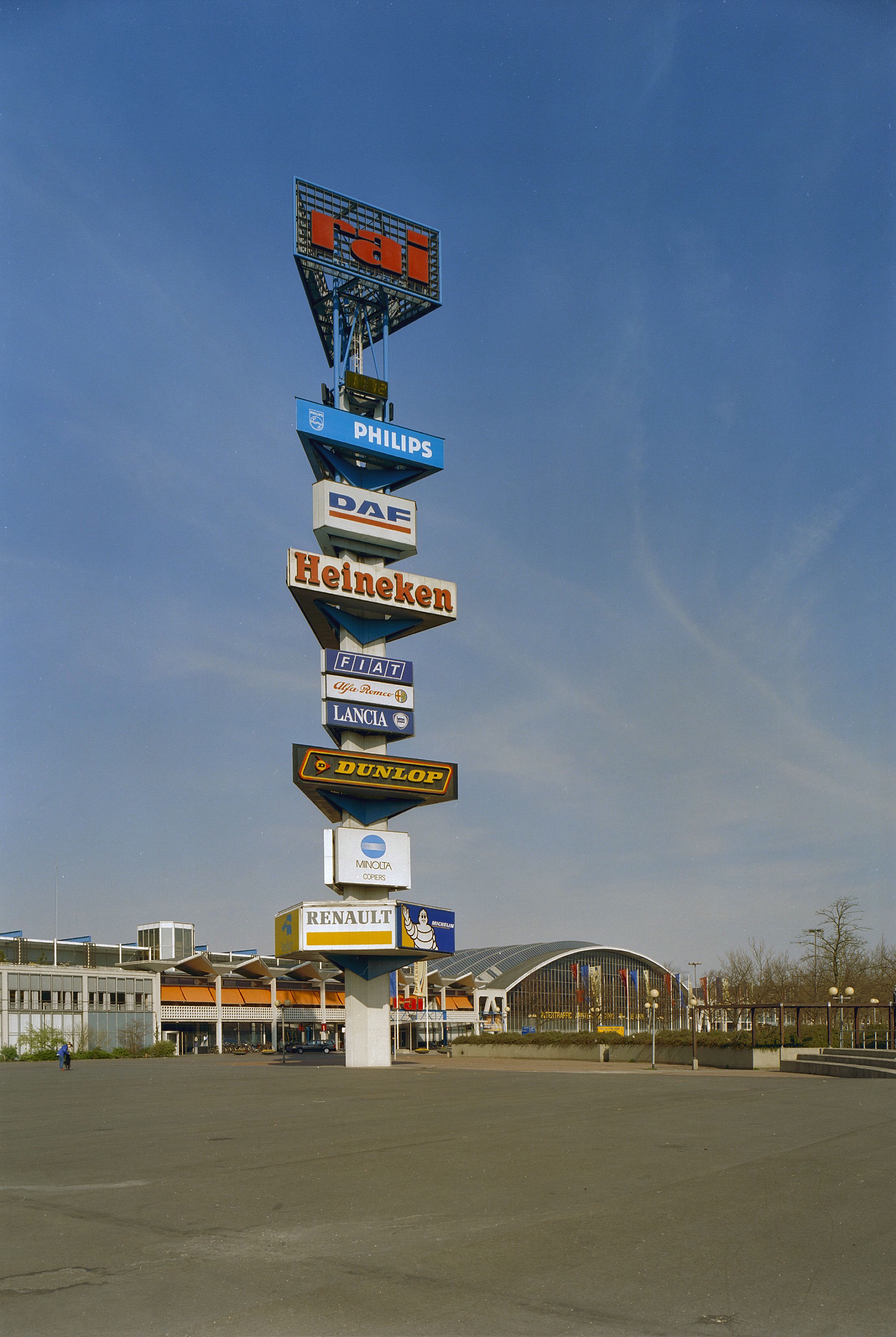 RAI-complex: Overzicht gedeelte voorgevel en reclamezuil (opmerking: Gefotografeerd voor Toonbeelden van de Wederopbouw)